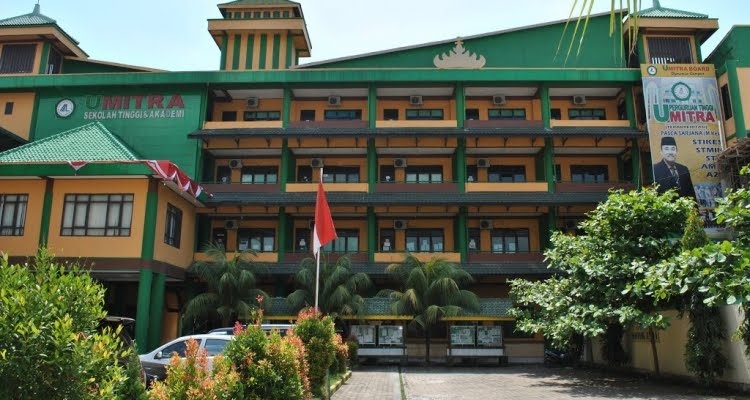 Universitas Mitra Indonesia